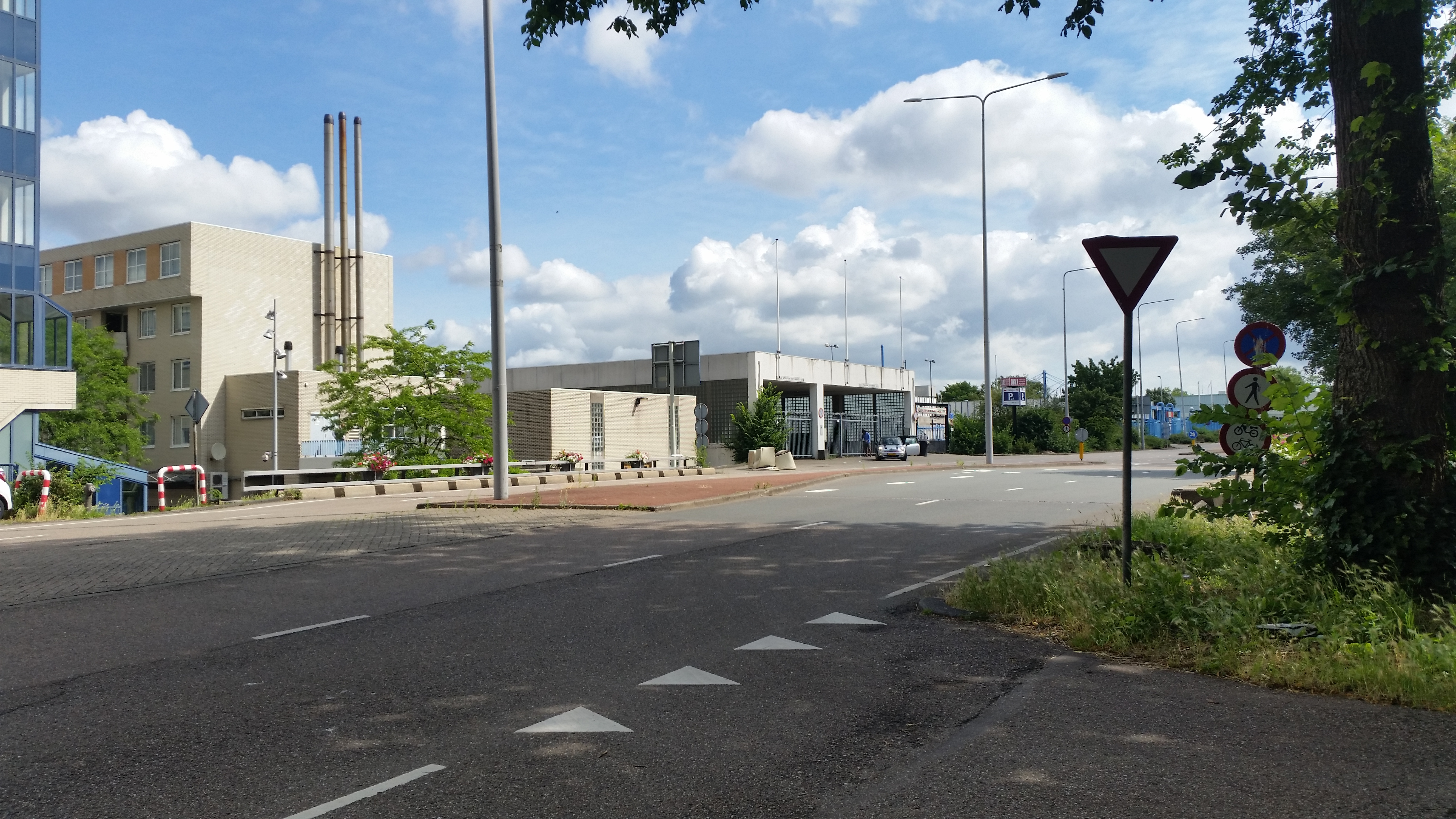 Impressie van de Boy Edgarbrug (brug 1064) in Amsterdam Zuidoost